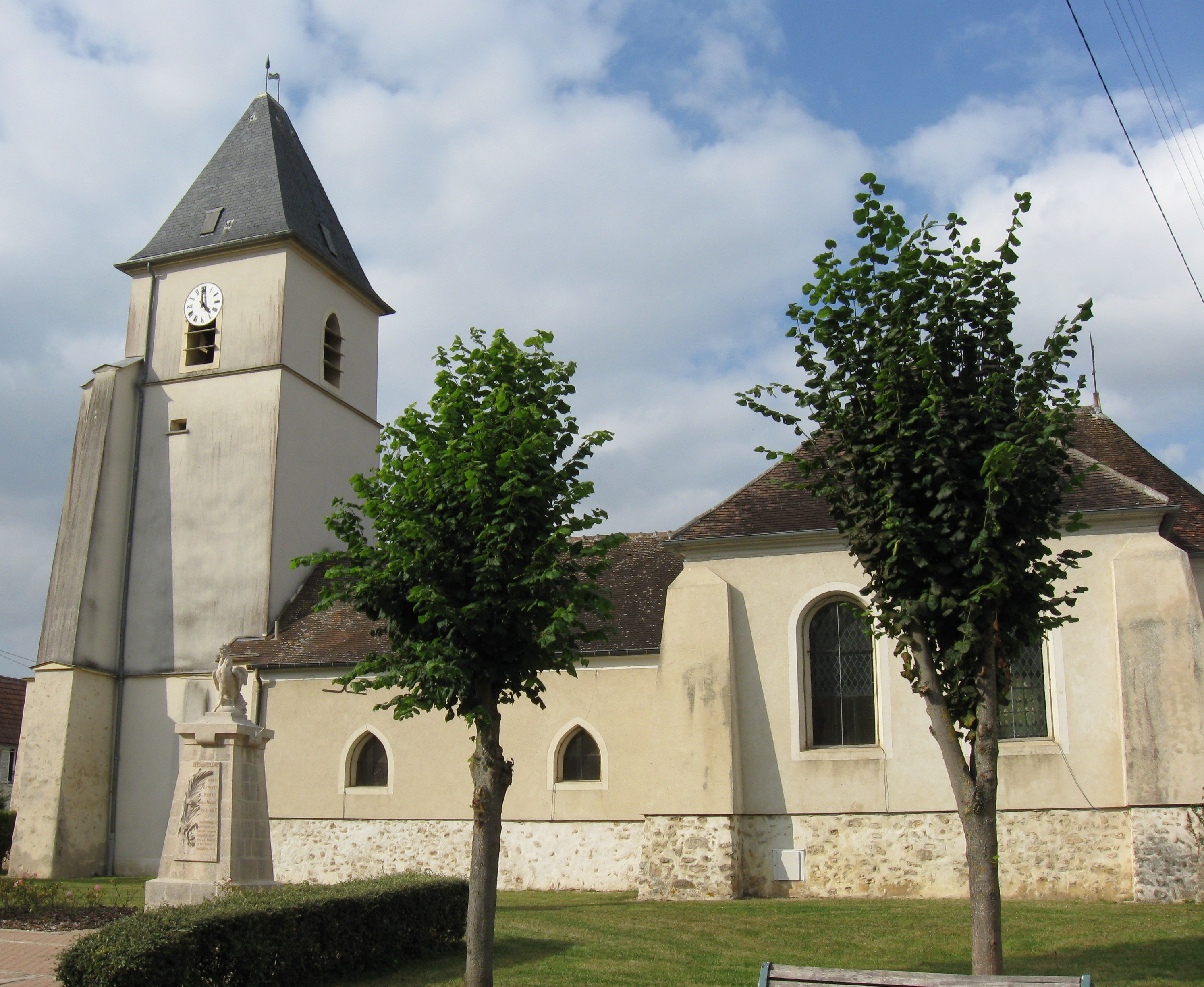 Église Saint-Maurice d'Isles-lès-Villenoy. (Seine-et-Marne, région Île-de-France).